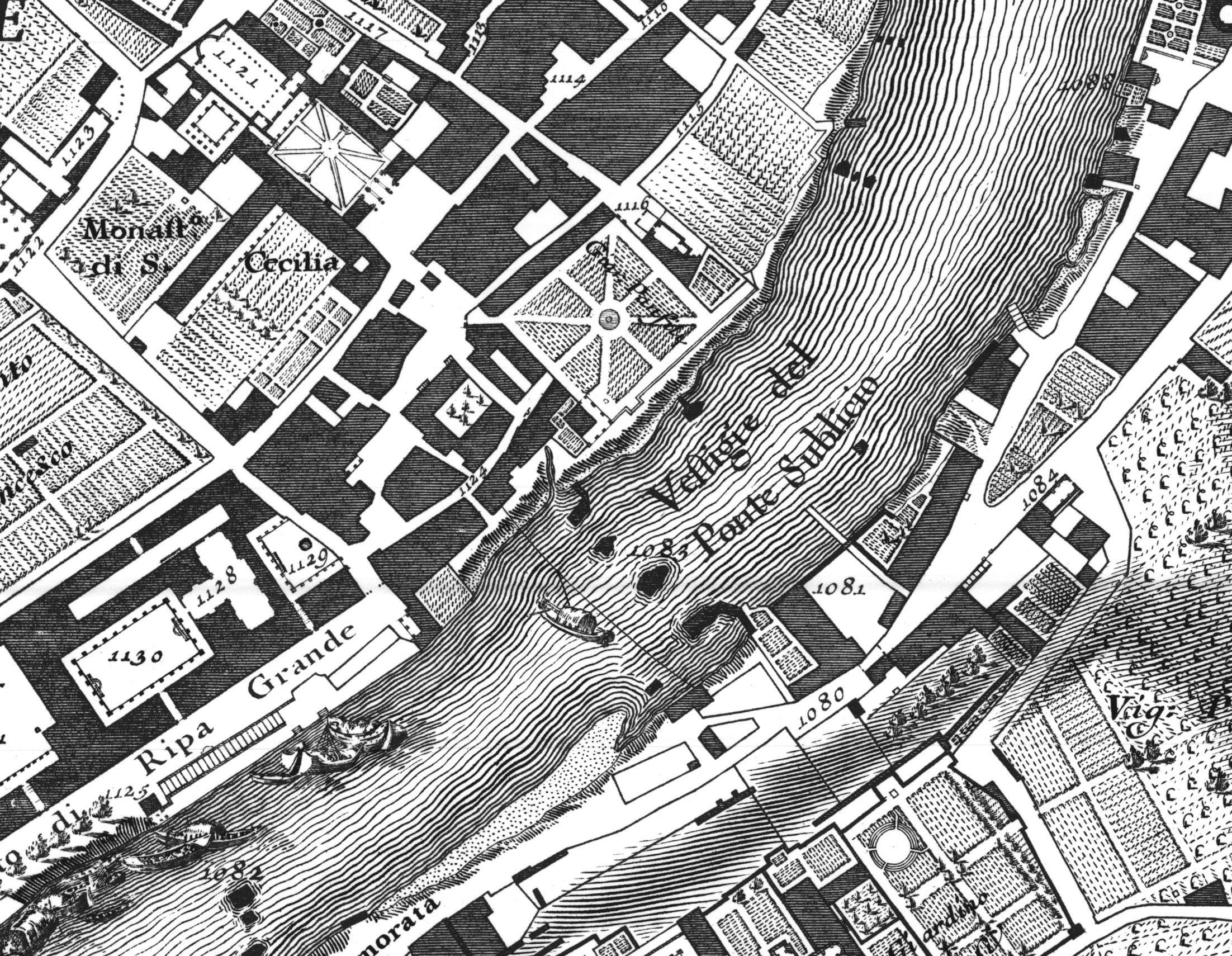 Roma, resti del Ponte Sublicio ancora esistenti nel XVIII secolo all'estremità del porto di Ripa Grande (furono poi demoliti completamente nel 1890). Particolare da Nuova Topografia di Roma di Giovanni Battista Nolli (1748), foglio 8.